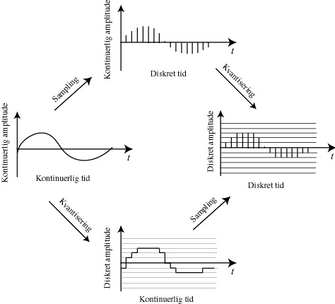 Kvantisering langs tids- og amplitudeaksane